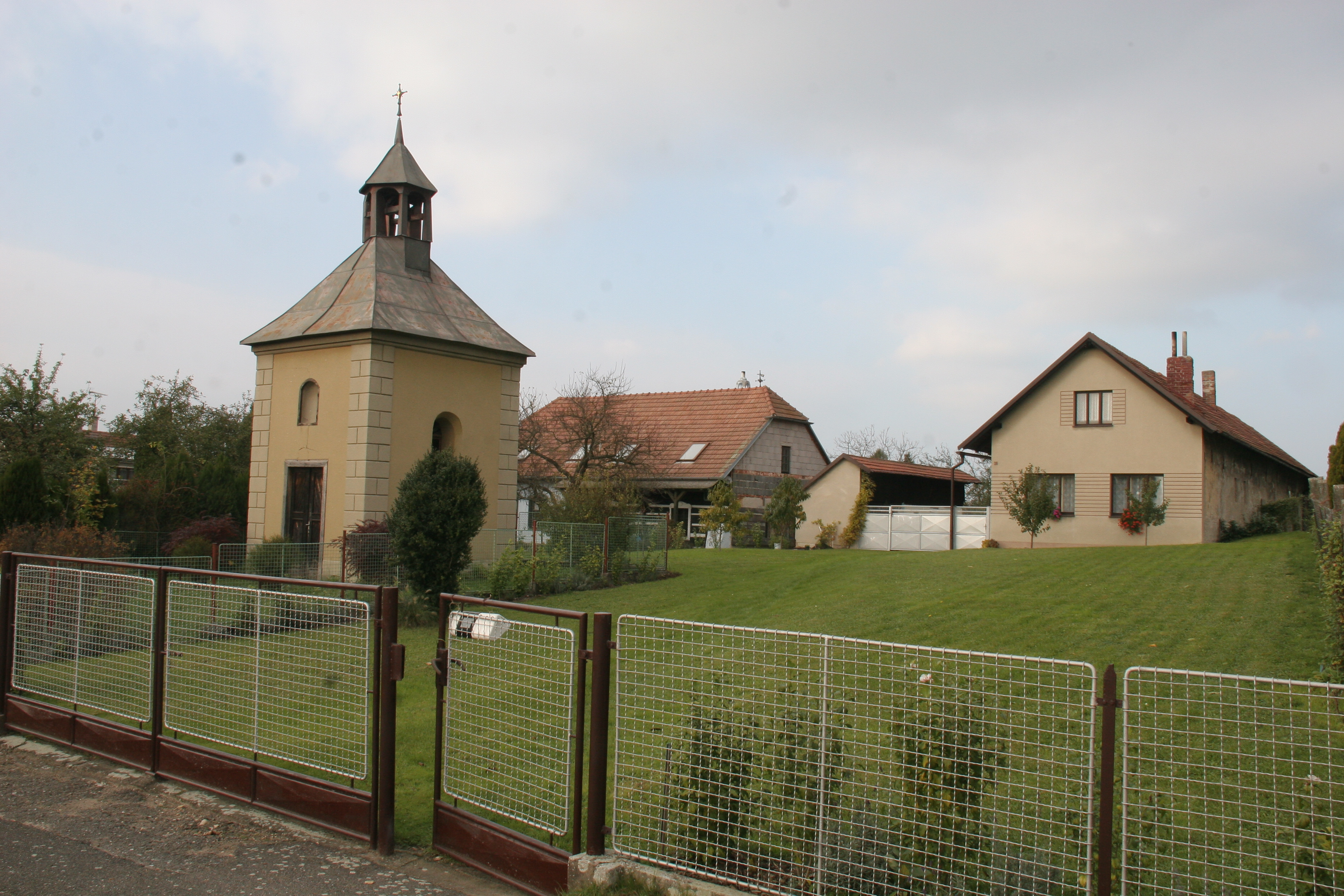 Trusnov kaple